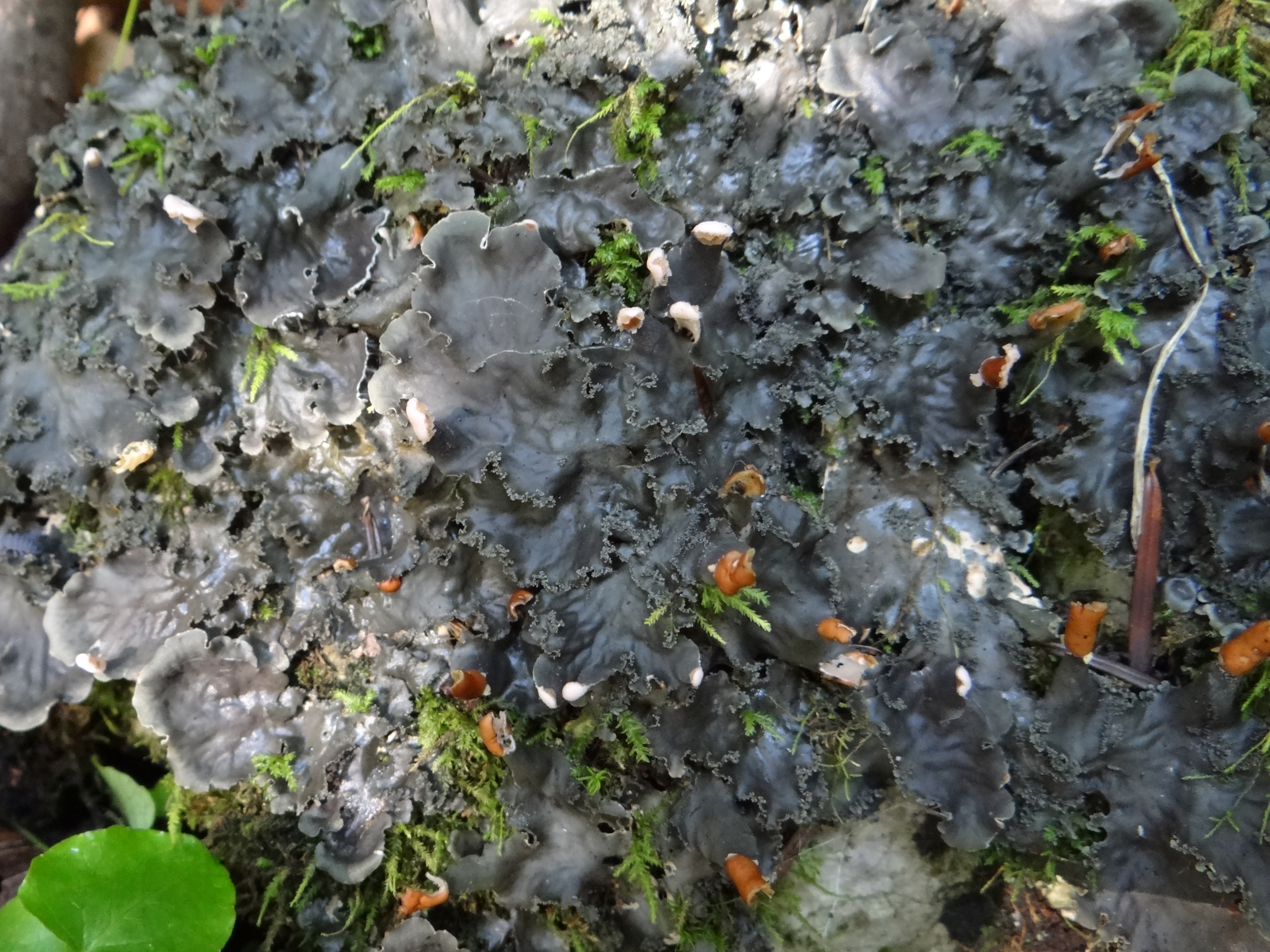 Peltigera praetextata (location: Poland, Pieniny, podnóża Trzech Koron w Sromowcach Niżnych)